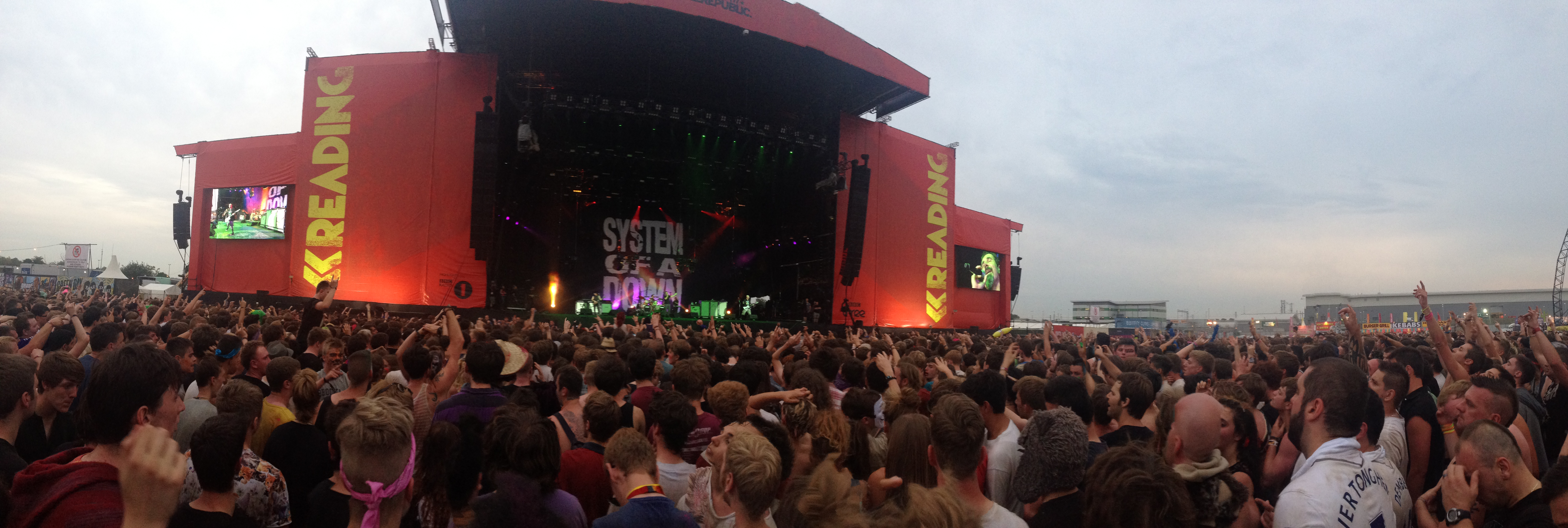 Reading Festival Panorama de la Main Stage en 2013